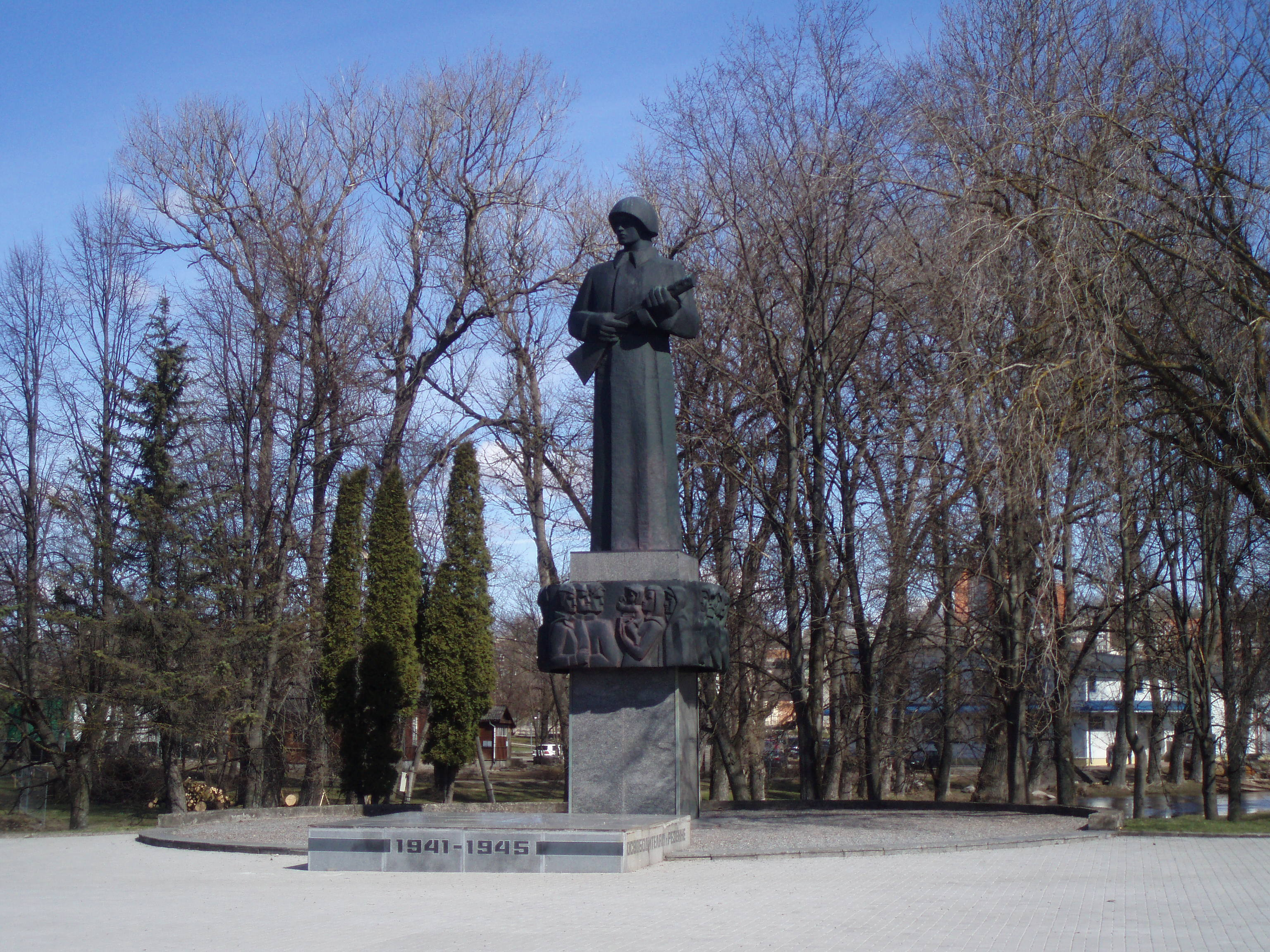 Piemineklis "Rēzeknes atbrīvotājiem".